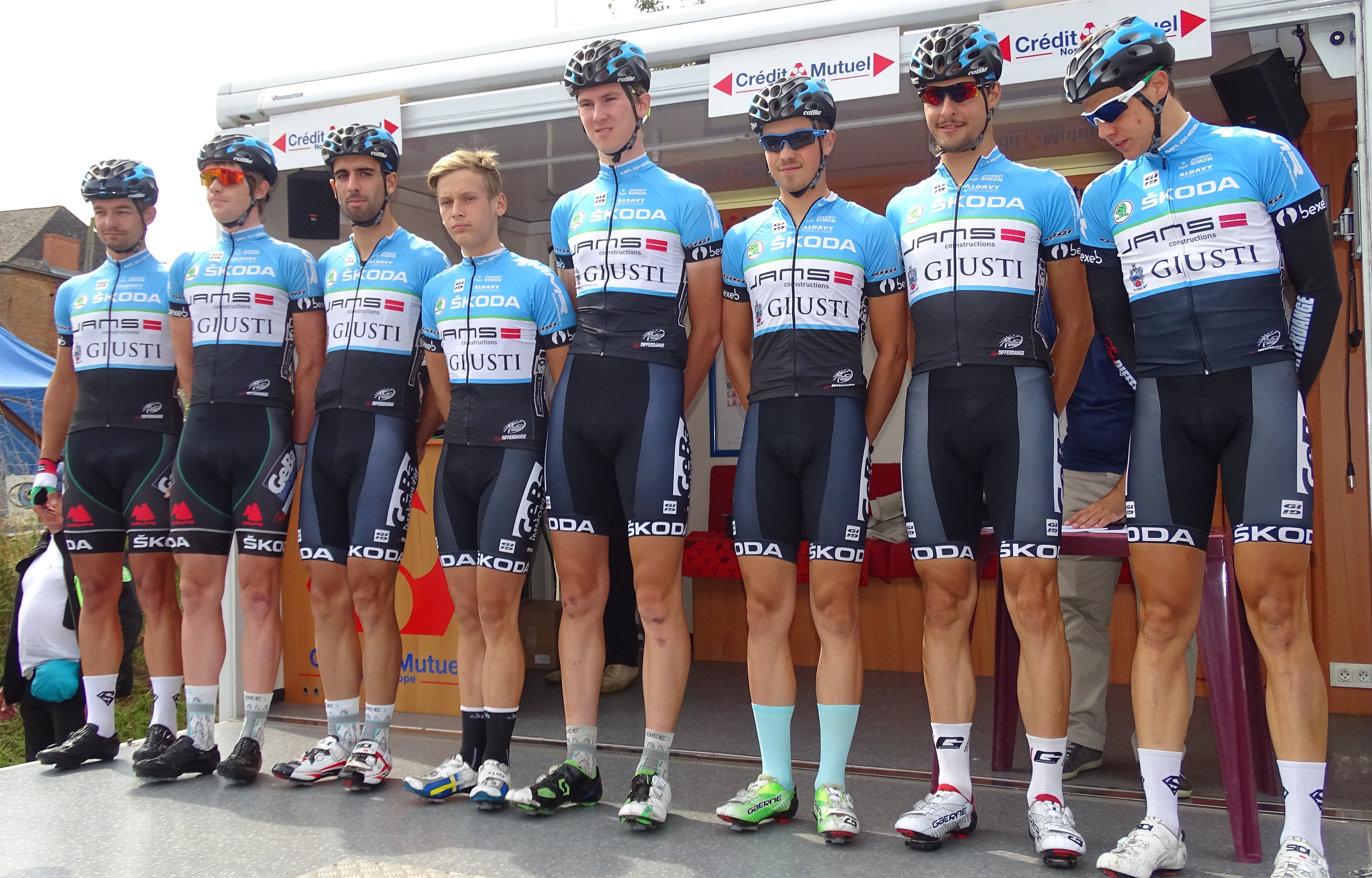 Reportage réalisé le mardi 25 août à l'occasion du départ et de l'arrivée du Grand Prix des Marbriers 2015 à Bellignies, Nord-Pas-de-Calais, France.